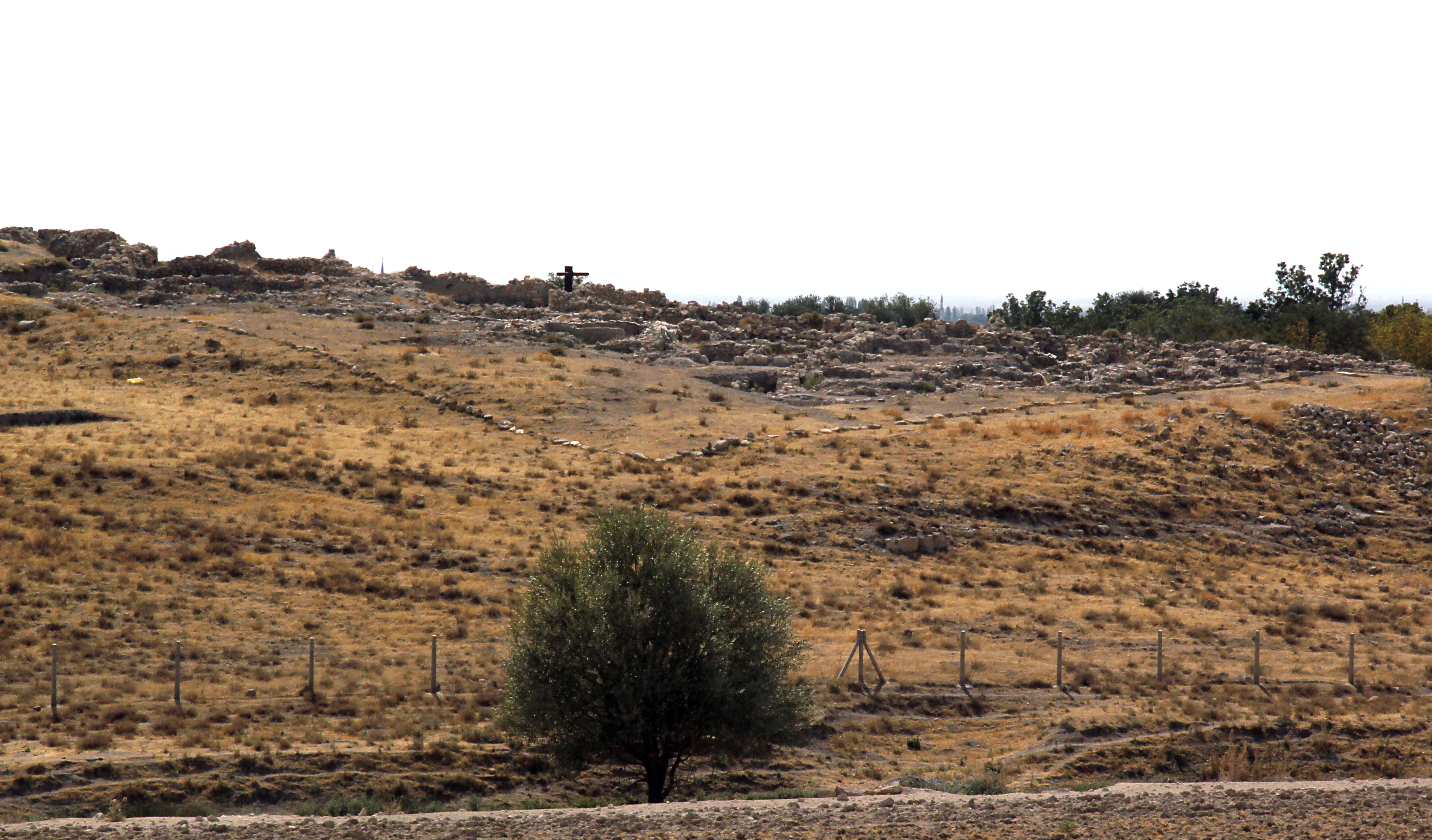 Köşk Höyük, Siedlungshügel bei Kemerhisar (Tyana), Zentraltürkei